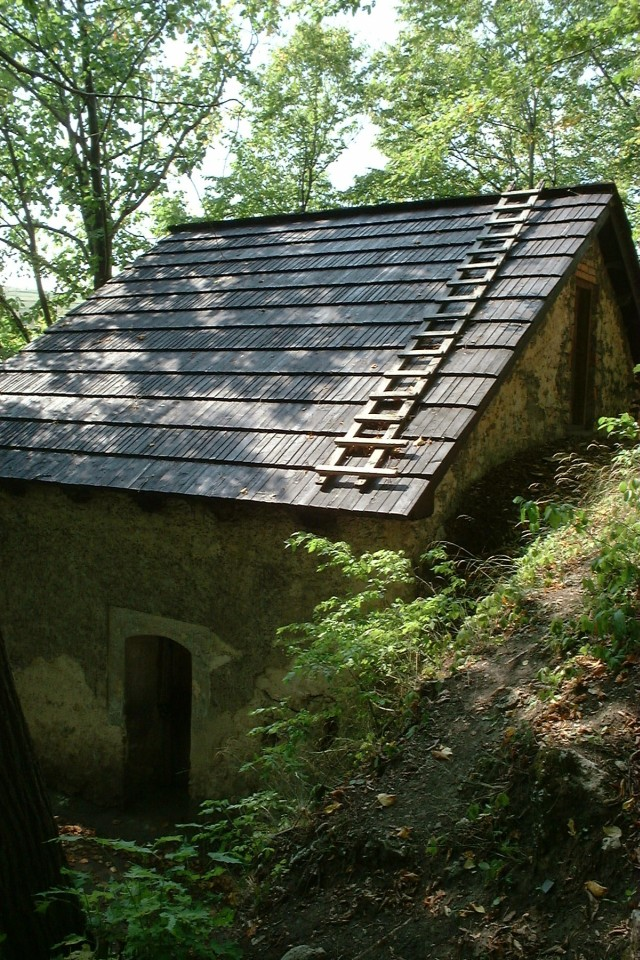 Poland, Skala - hermitage.